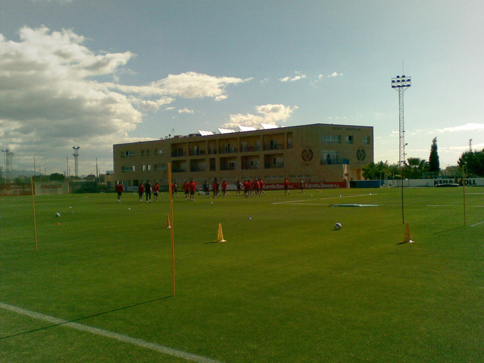 Entrenamiento en la Ciudad Deportiva del Villarreal CF